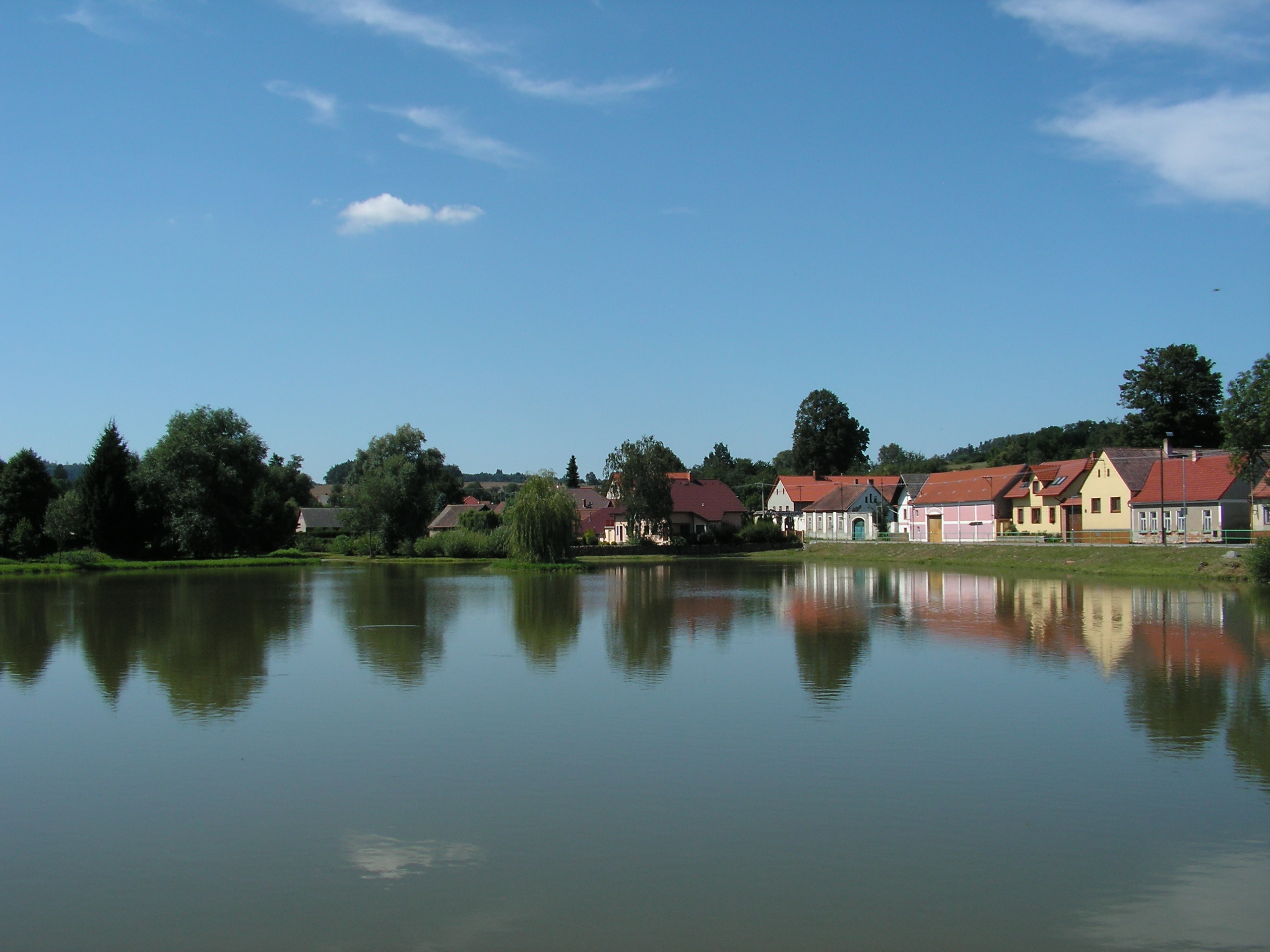 Návesní rybník ve Zvěstově v okrese Benešov